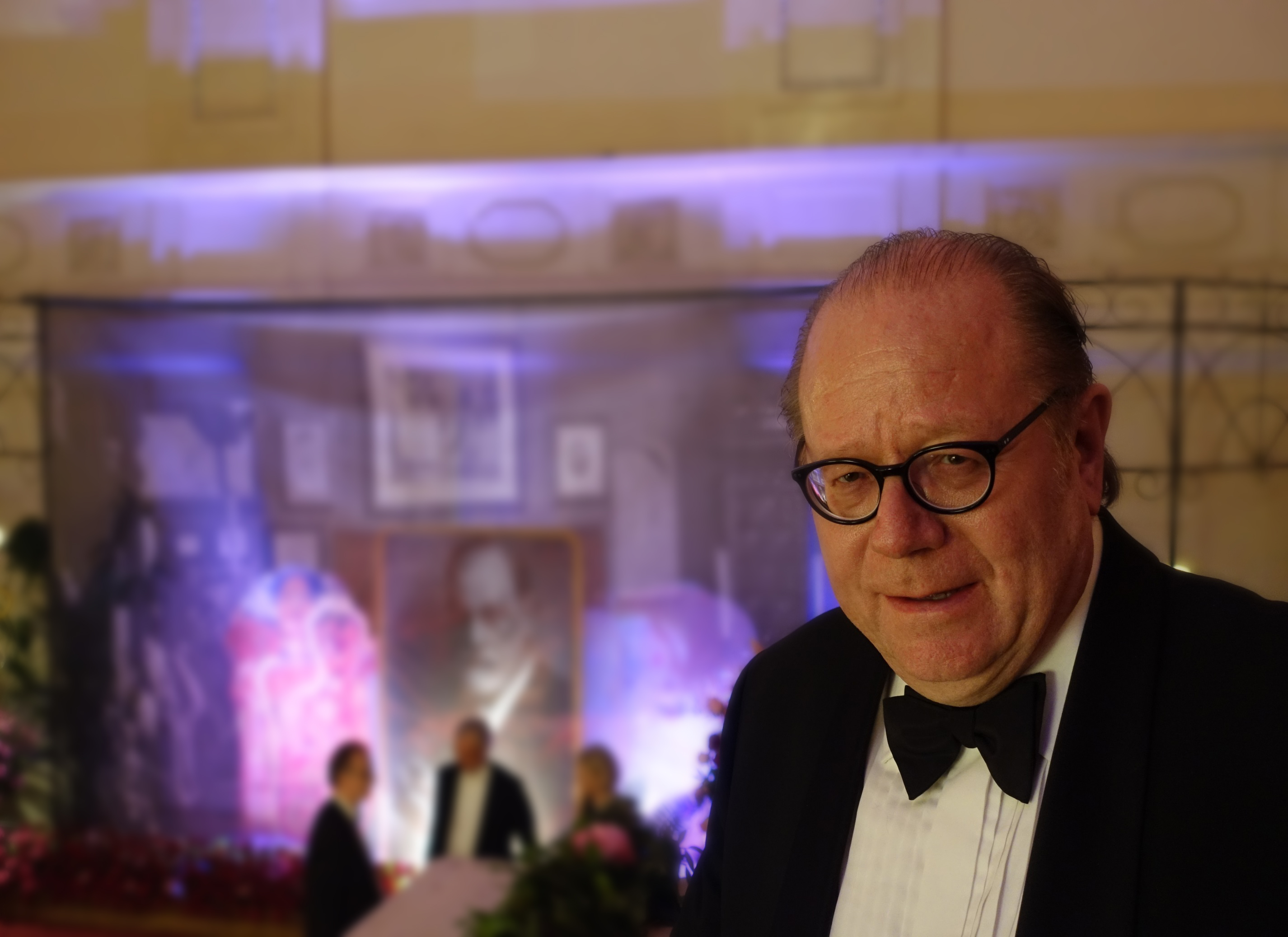 Prof. Dr. Dirk Dressler